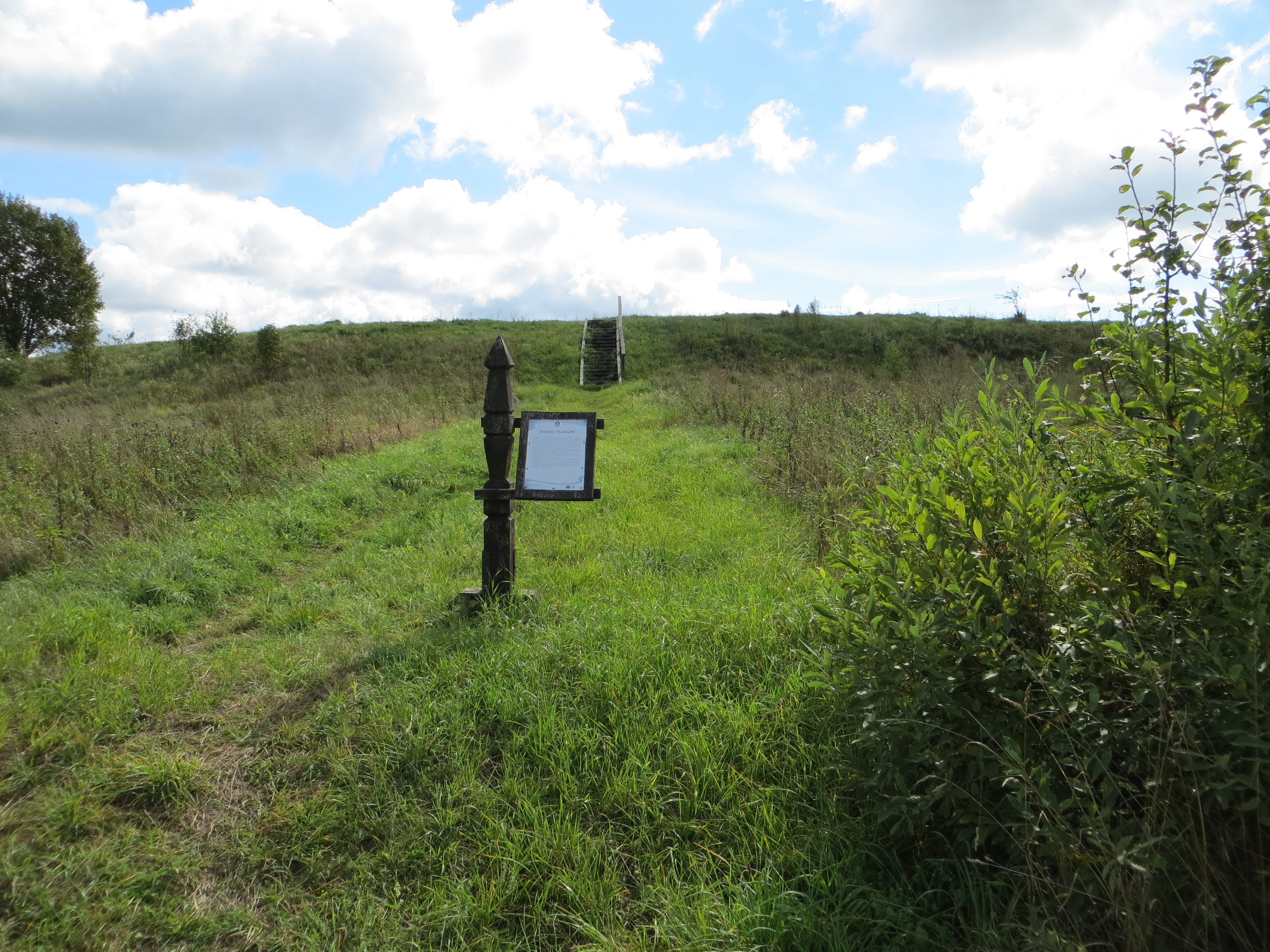 Dūkšto sen., Lithuania